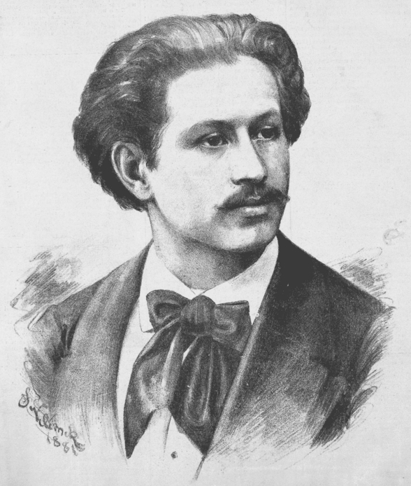 Portréty osobností od Jana Vilímka